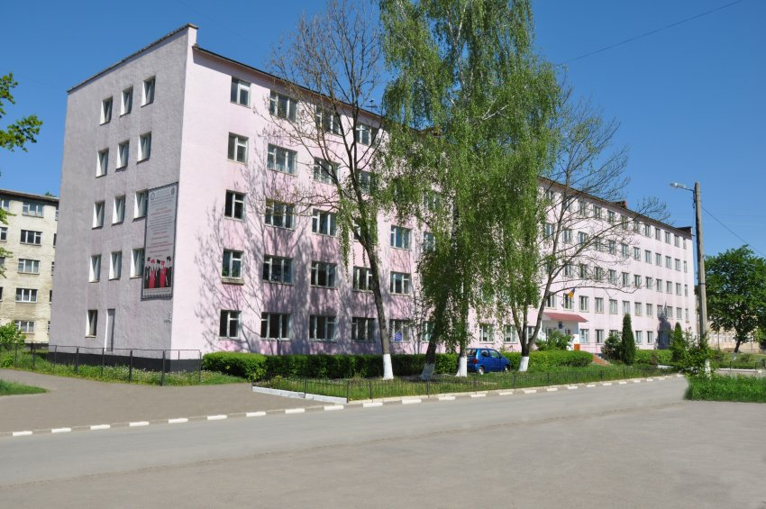 Калуське ПТУ